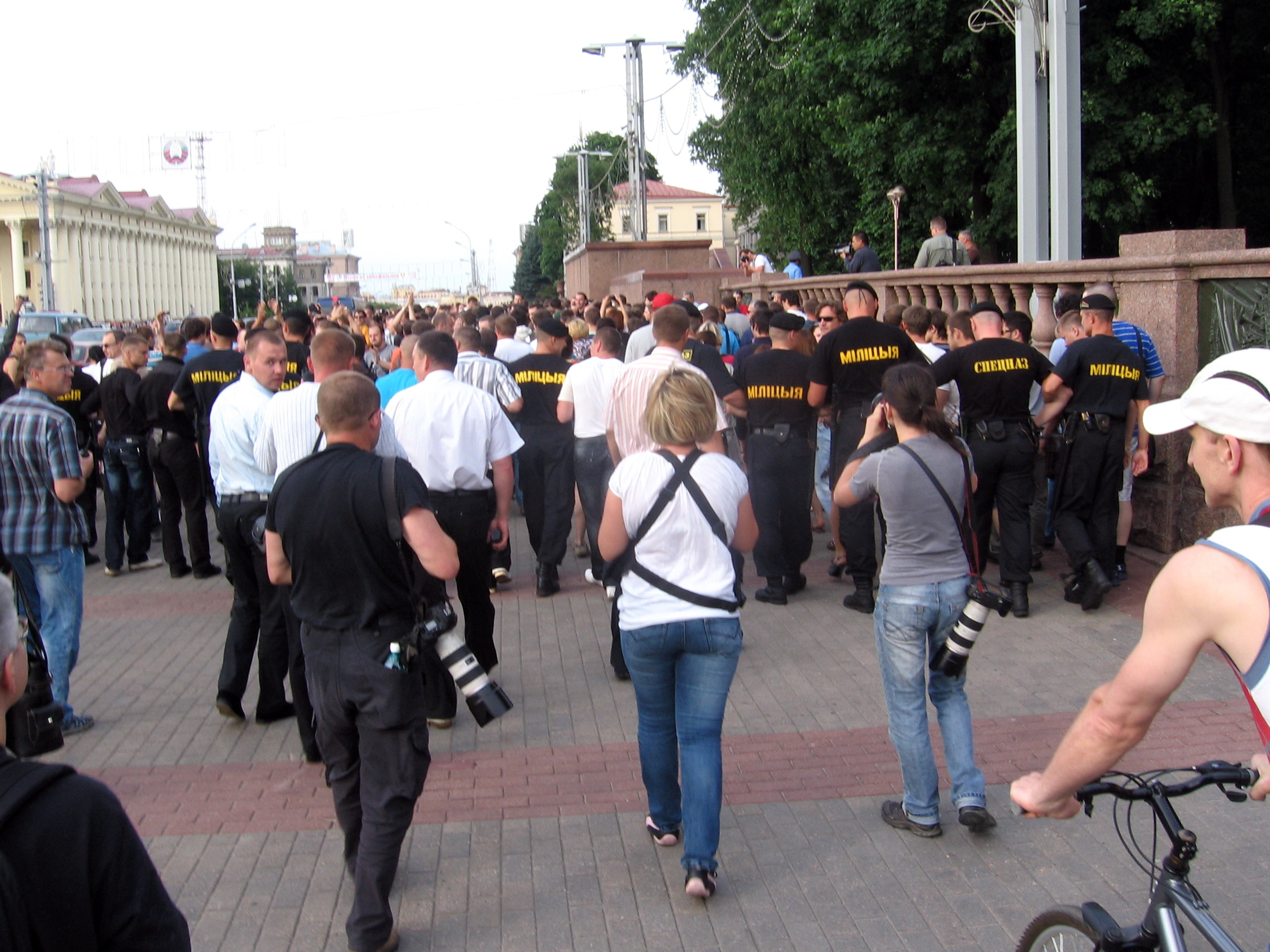 Беларуская (тарашкевіца): Спэцназ выцясьняе ўдзельнікаў «маўклівае акцыі» 15 чэрвеня 2011 року